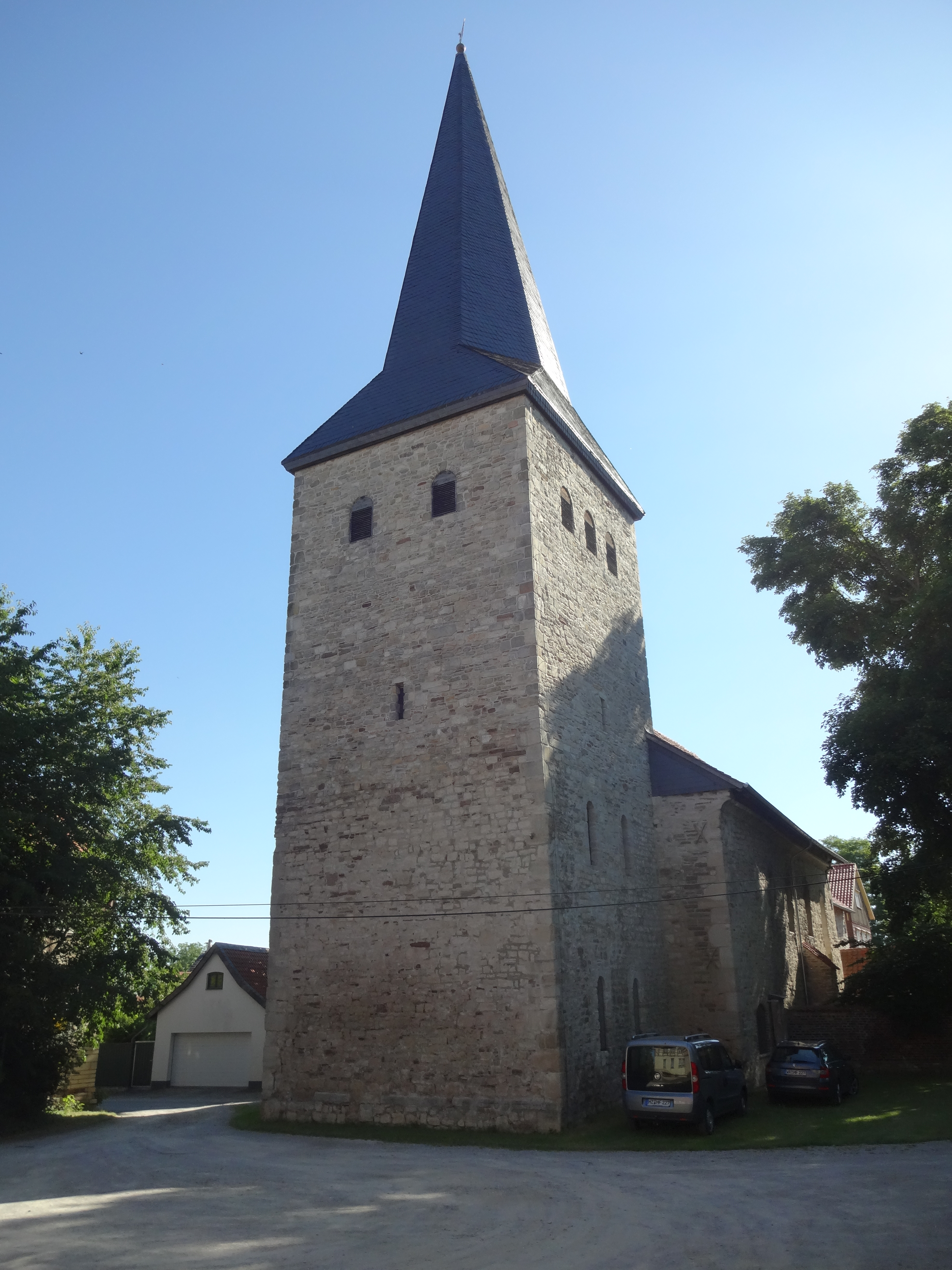 Dorfkirche Langeln in der Gemeinde Nordharz